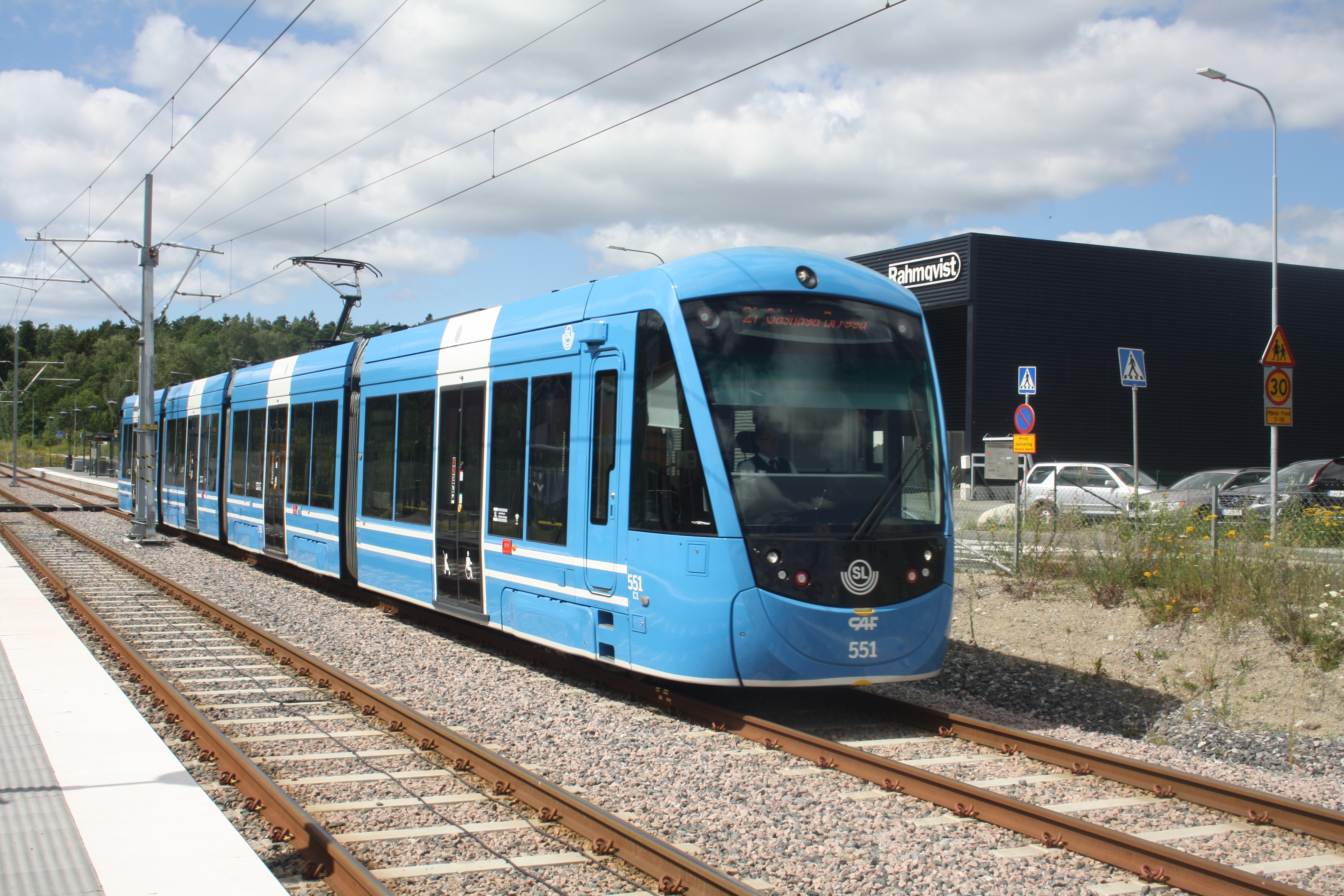 Lidingöbana, A36 lämnar Gåshaga